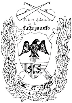 catapanato sanpaolo stemma